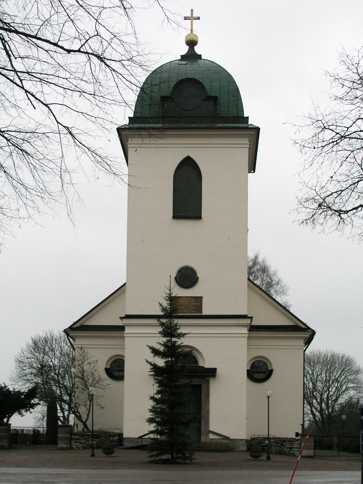 Ljungs kyrka, Östergötland, Diocese of Linköping